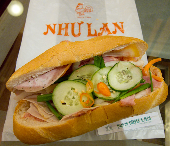 Banh Mi Thit